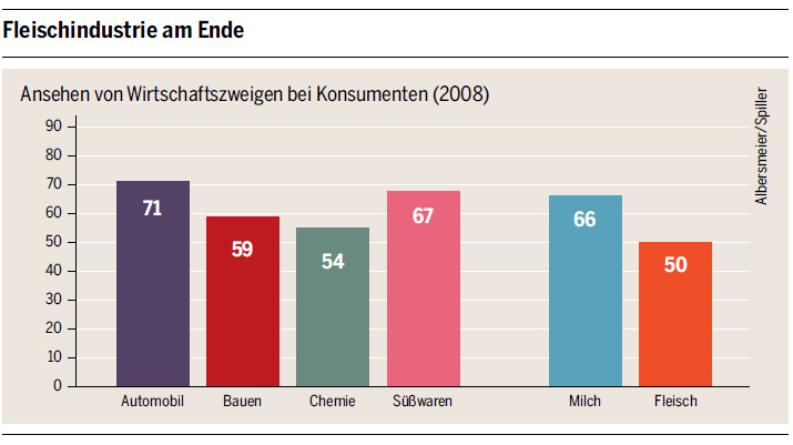 Ansehen von Wirtschaftszweigen bei Konsumenten (2008), Quelle: Universität Göttingen, Albersmeier/Spiller, Grafik aus der Publikation "Fleischatlas" herausgegeben von: Heinrich-Böll-Stiftung, BUND, Le Monde diplomatique